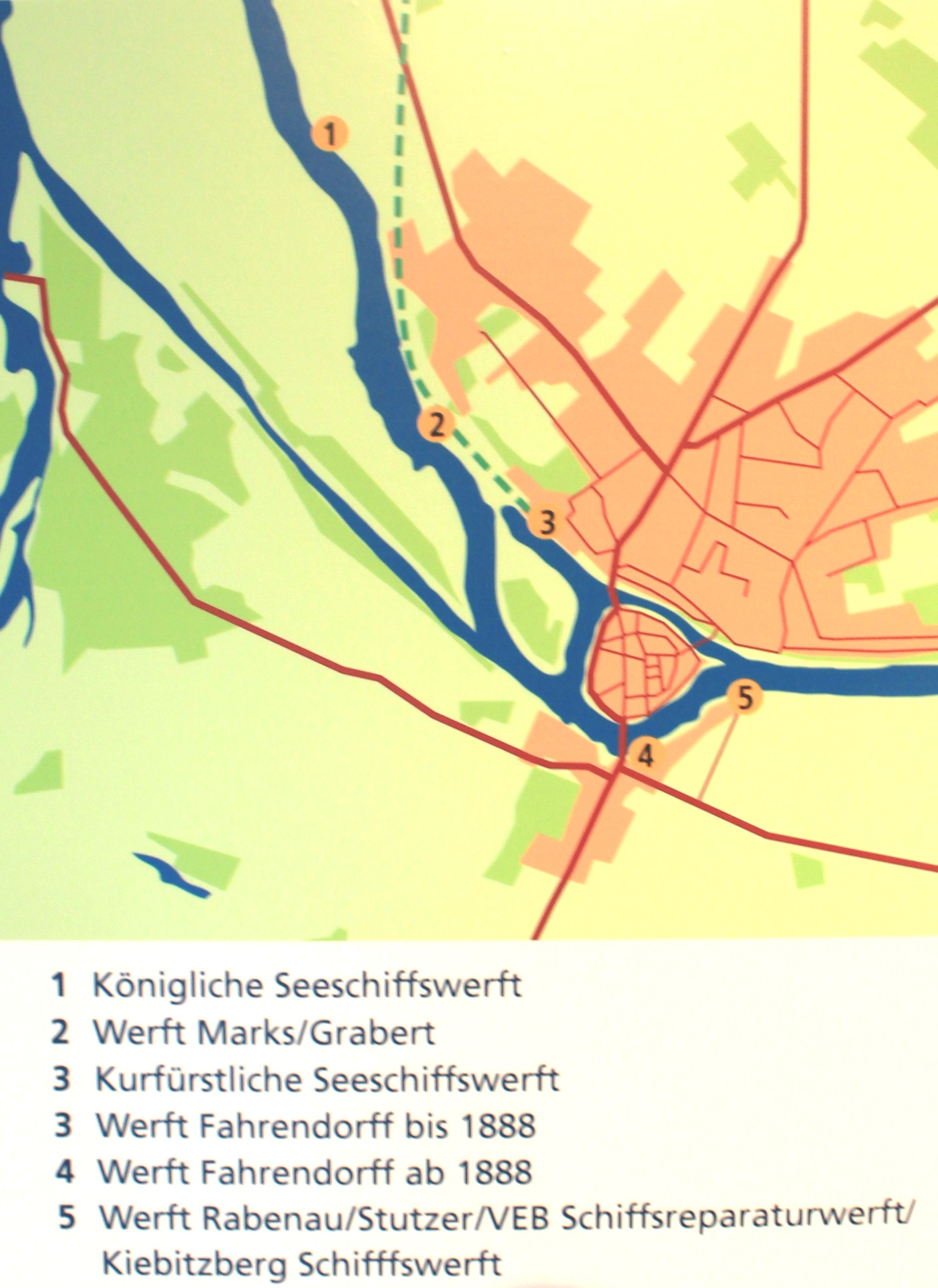 Schiffswerften in Havelberg